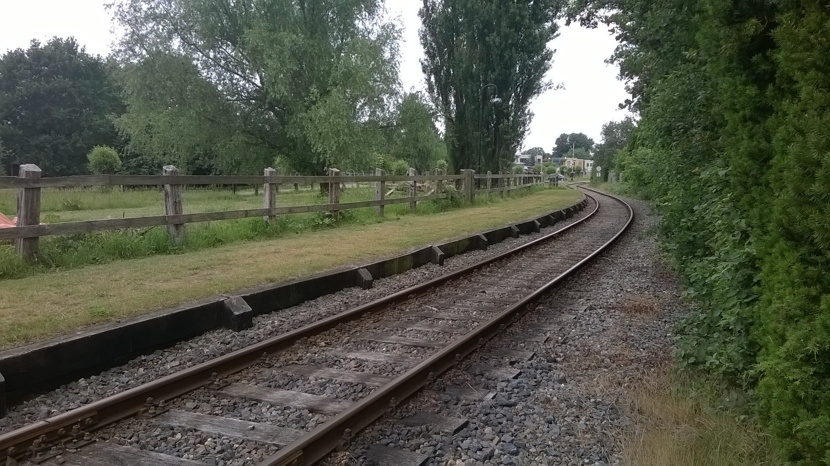 Halte Blokker is een tramhalte van de Museumstoomtram Hoorn-Medemblik. De halte is niet langer in gebruik en heeft geen bouwwerk.